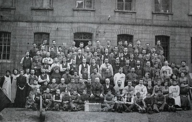 Belegschaft der Firma Brander in Regensburg um 1906